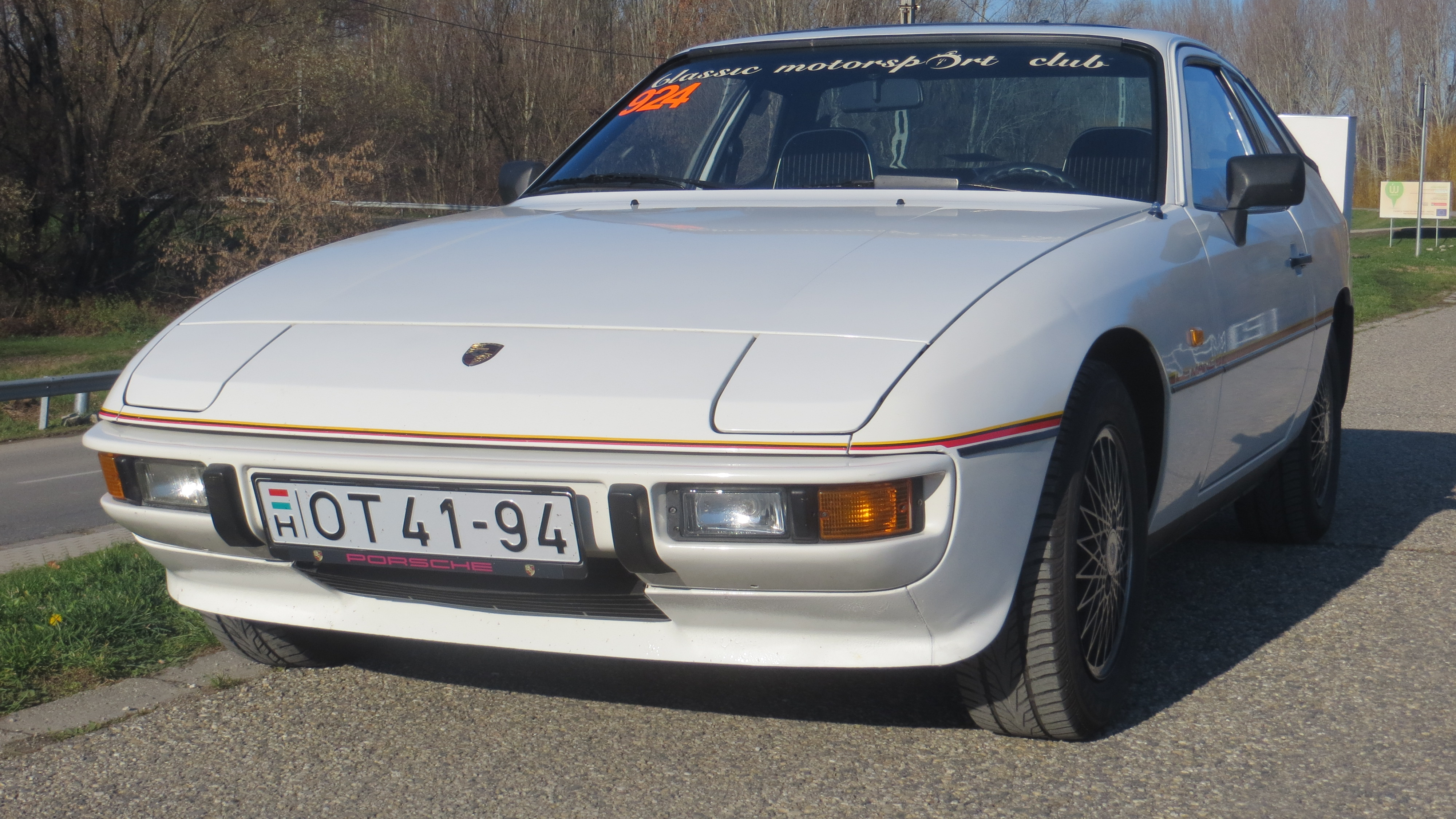 Ez a különleges modell a Porsche Le Mans-i 24 órás autóversenyeken elért hatalmas sikerei előtti tisztelgés. Összesen 1002 darab (más források szerint 1030) épült a modellből, mindegyik alpesifehér színben, körbefutó sárga-fekete-vörös díszítő csíkkal, az első sárvédőkön ugyanilyen színű Le Mans felirattal. A modellen a 924 Turbo hátsó spoilere van, 6J×15-ATS Turbo-Look keréktárcsák, belül csíkos „Nadelstreifen” kárpitozású Turbo ülések fehér szegéllyel, 36 cm átmérőjű négyküllős bőrkormány, bőr váltógomb, az ajtóküszöbön fekete alapon fehér 924 felirat. A gépkocsihoz többféle extrát is lehetett rendelni, elektromos ablakot, elektromosan állítható külső tükröket, hátsó ablaktörlőt, fényszórómosót, légkondicionálót és kivehető targatetőt is. Jobbkormányos kivitelben 100 darab készült.